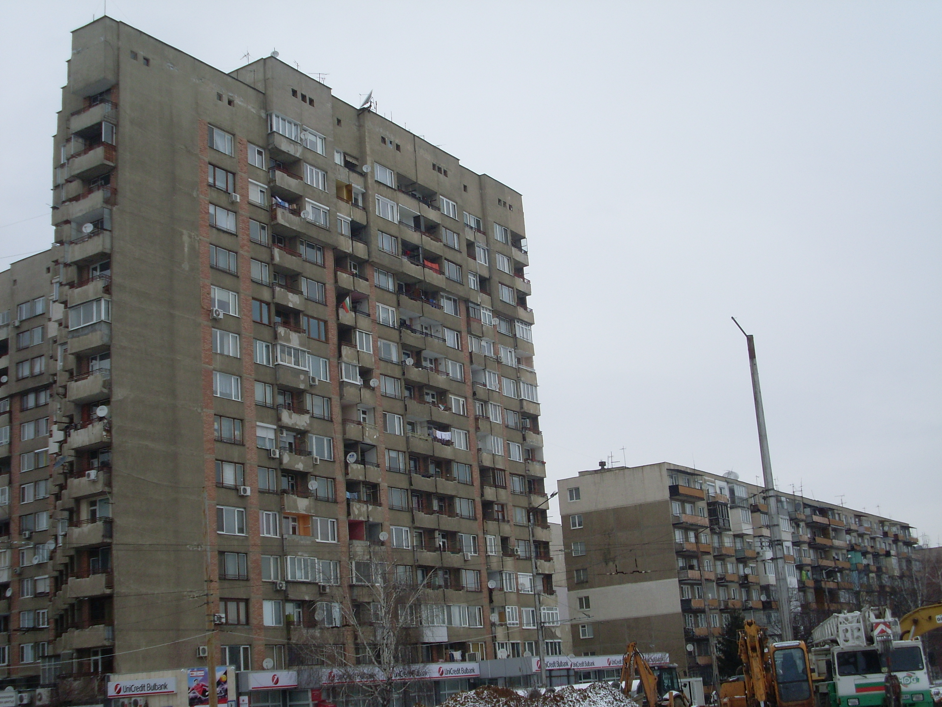 Bloque de la era comunista, Sofia, Bulgaria, 2011